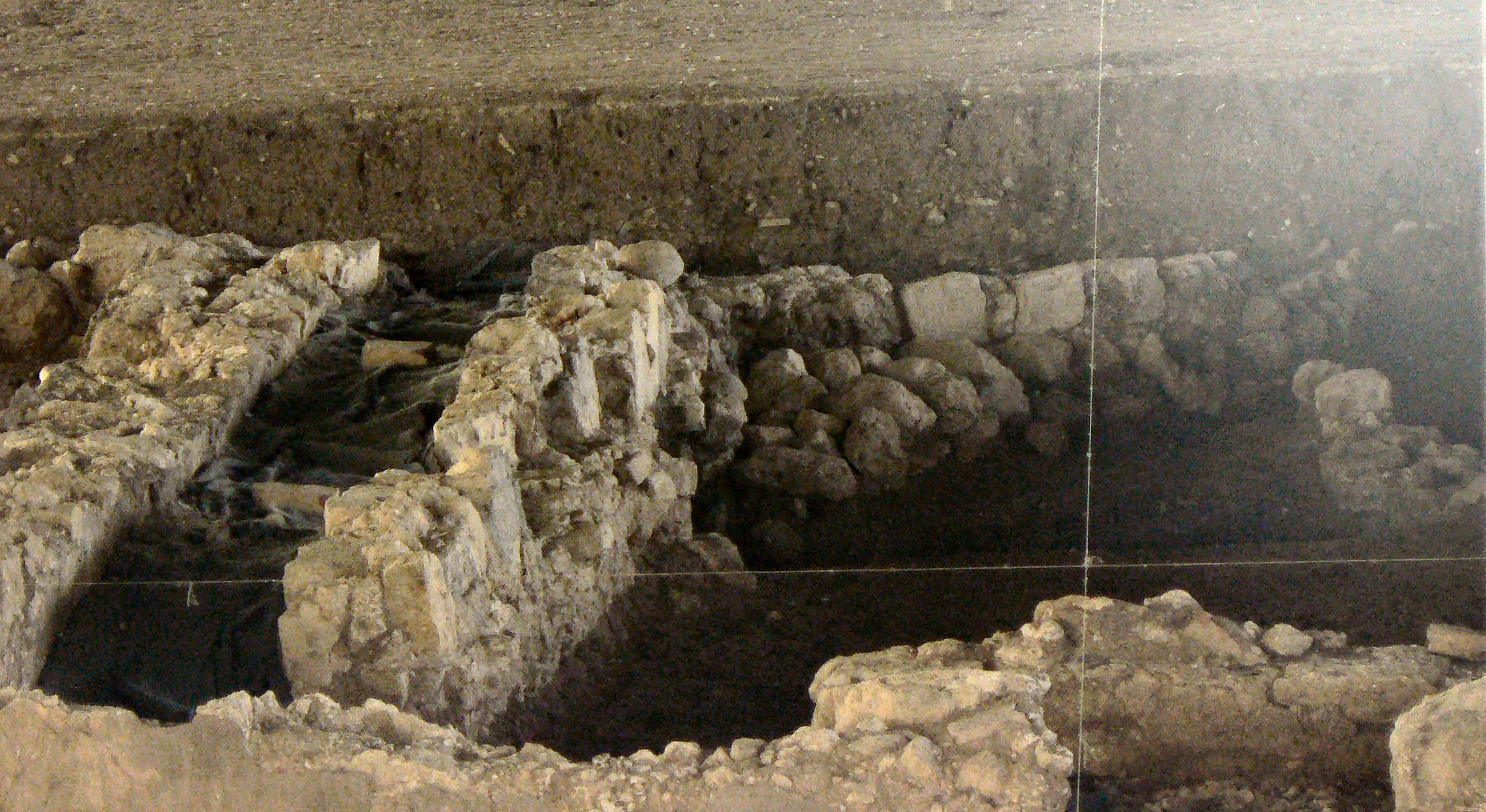 Vila Romana de Frielas